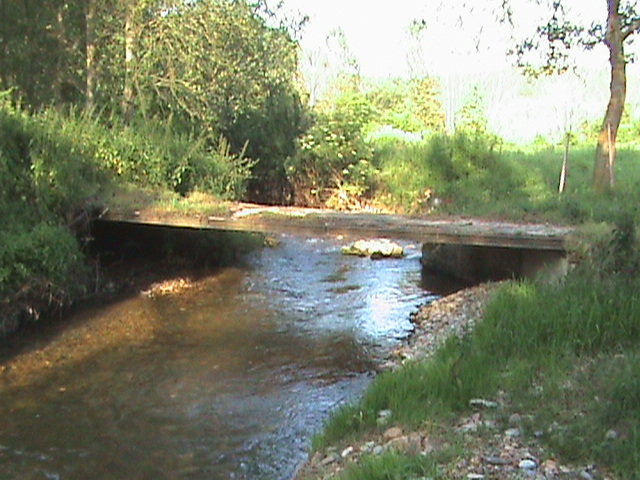 Antiguo puente sobre el río Oca